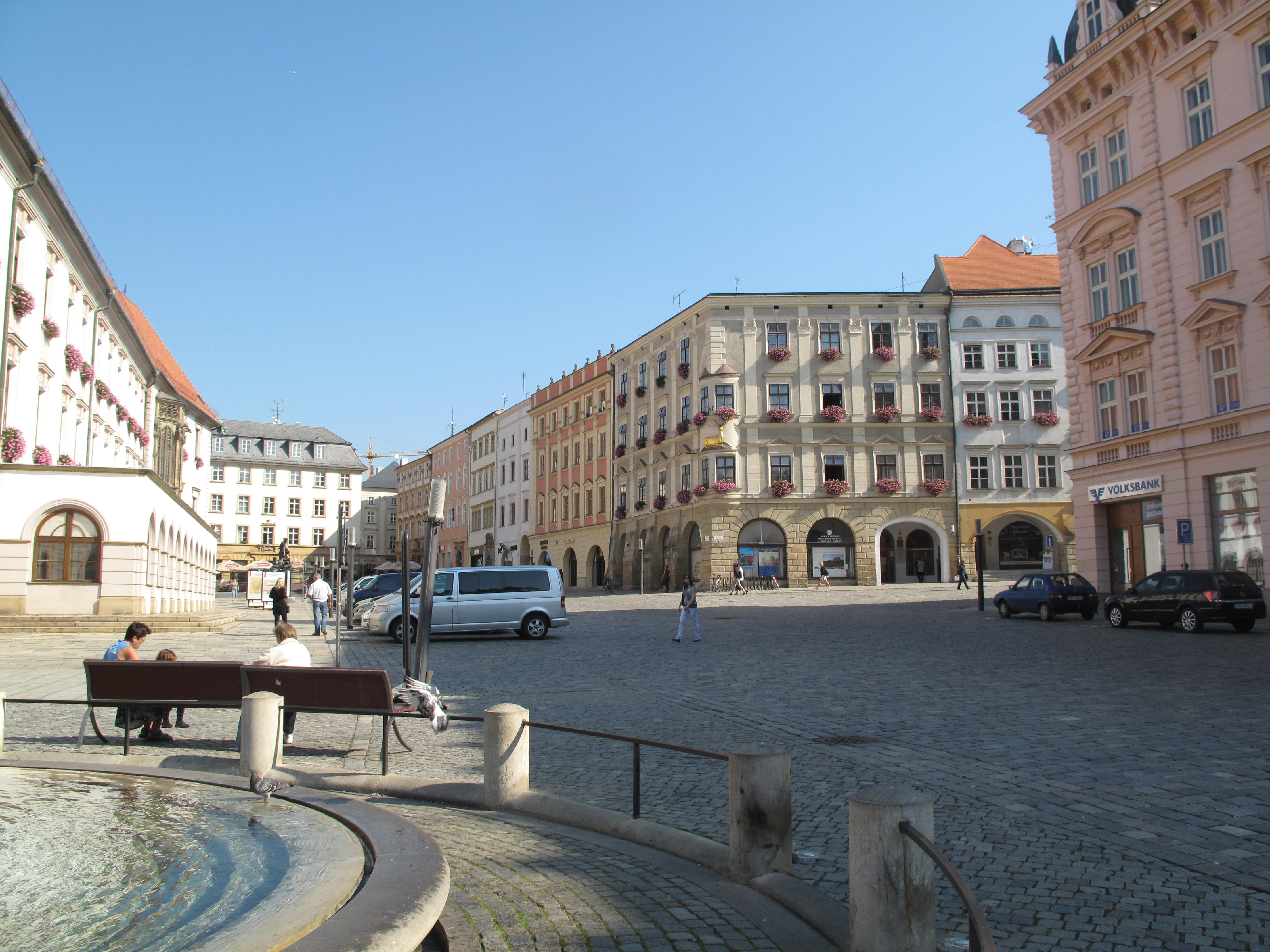 Česky: Olomouc